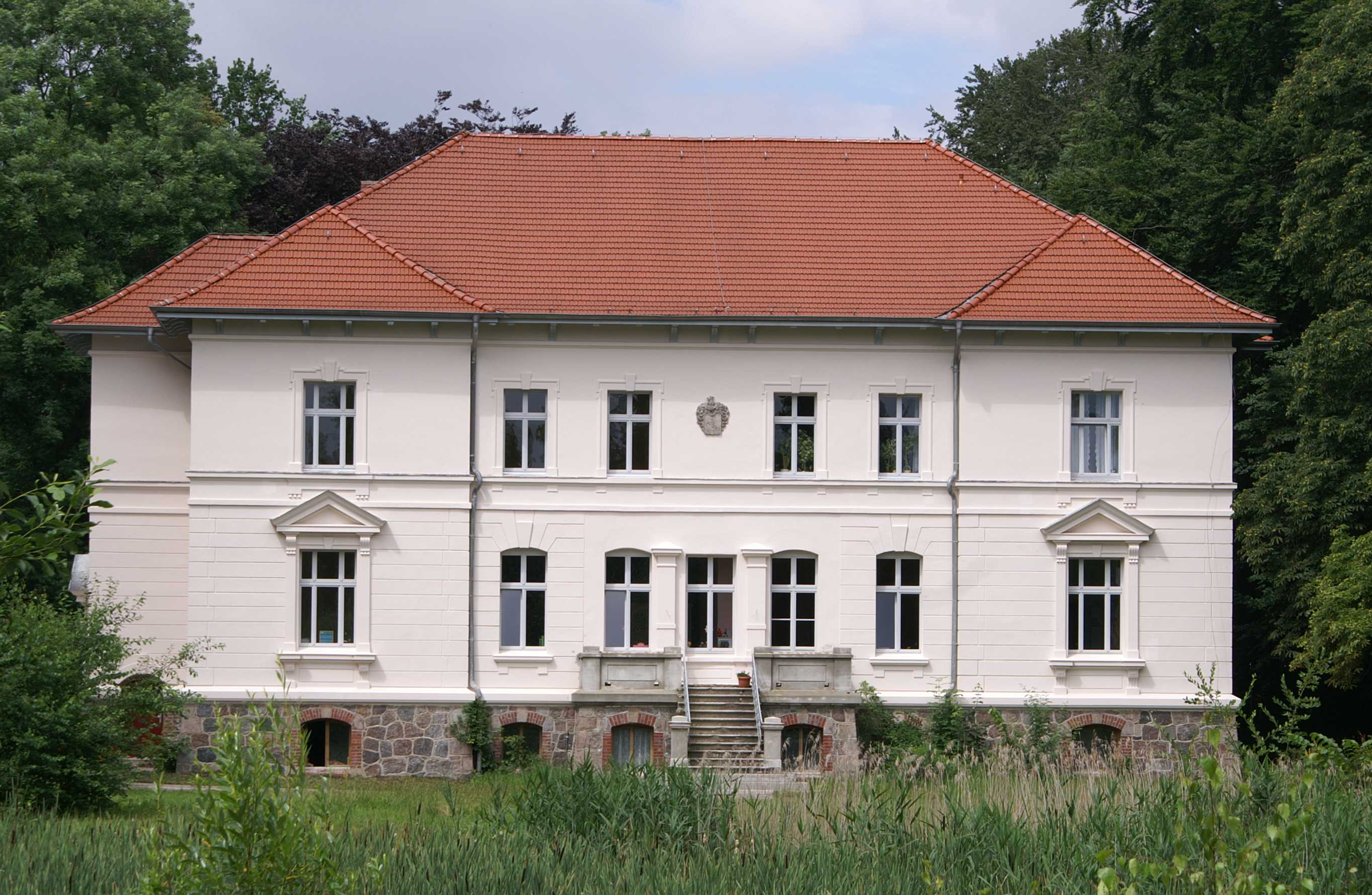 Gutshaus in Klein Zastrow - Landkreis Ostvorpommern